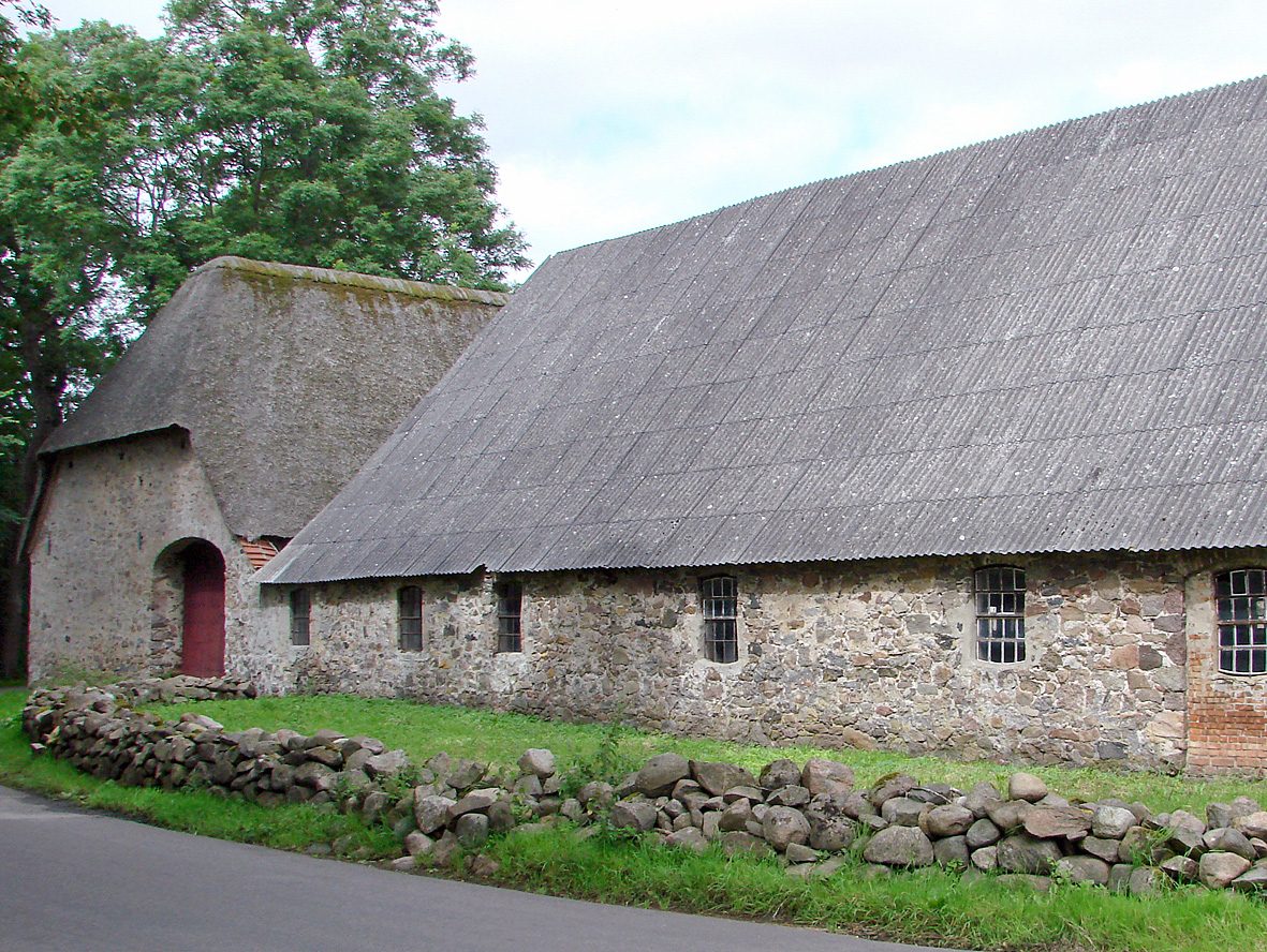 Ring Kloster, den nuværende gård på stedet